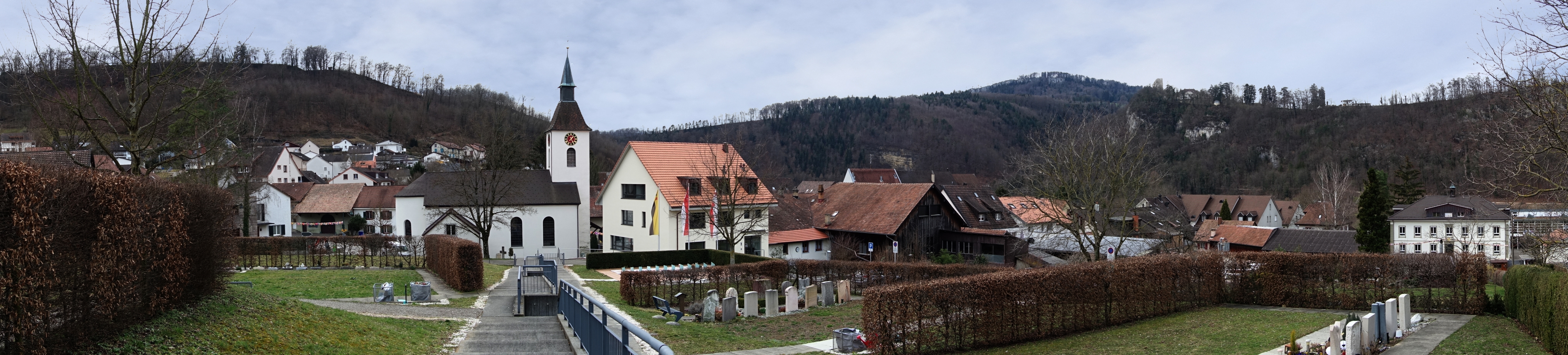 Duggingen, Basel-Land, Schweiz